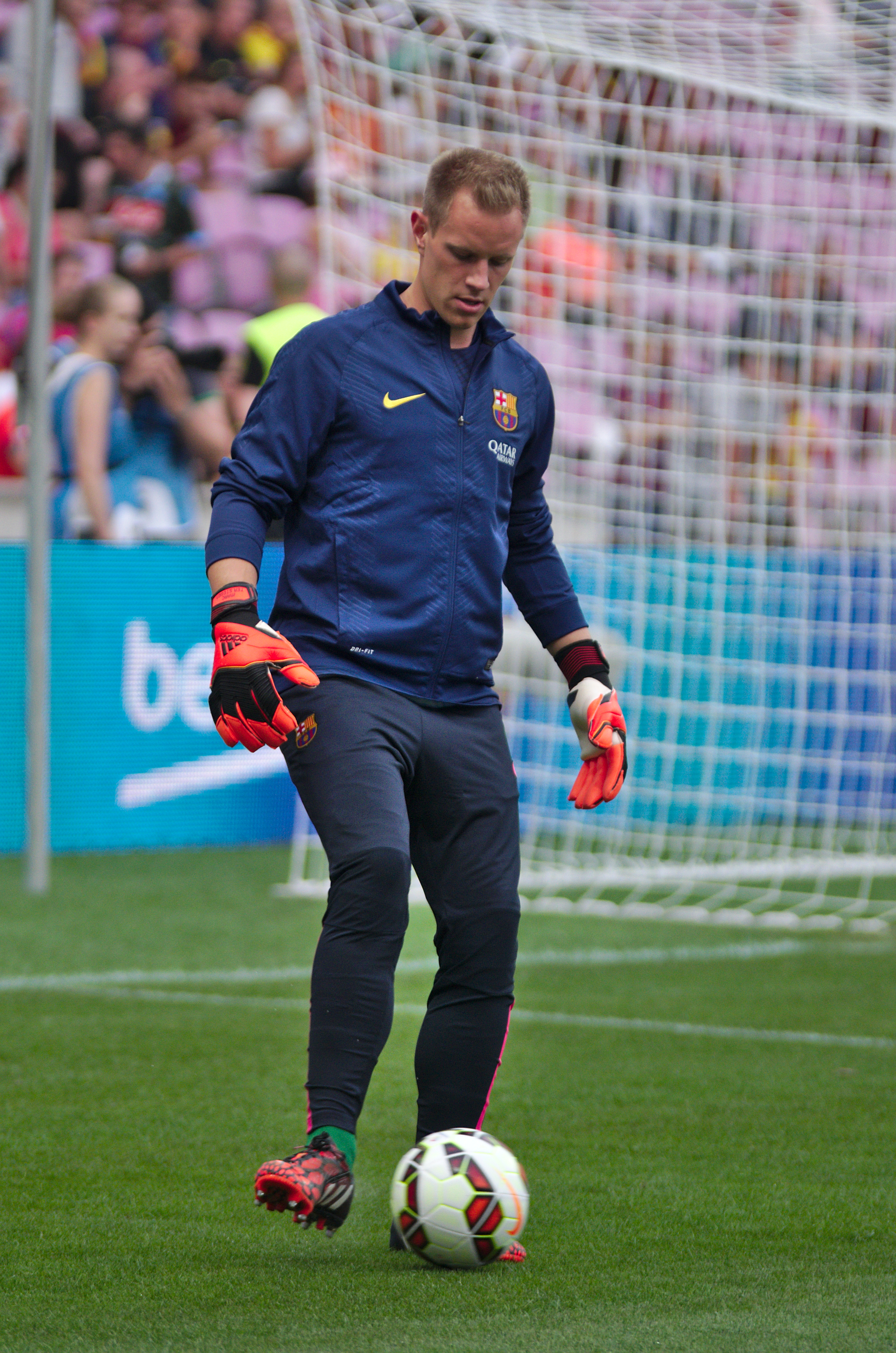 Barça - Napoli - 20140806 - Marc-André ter Stegen